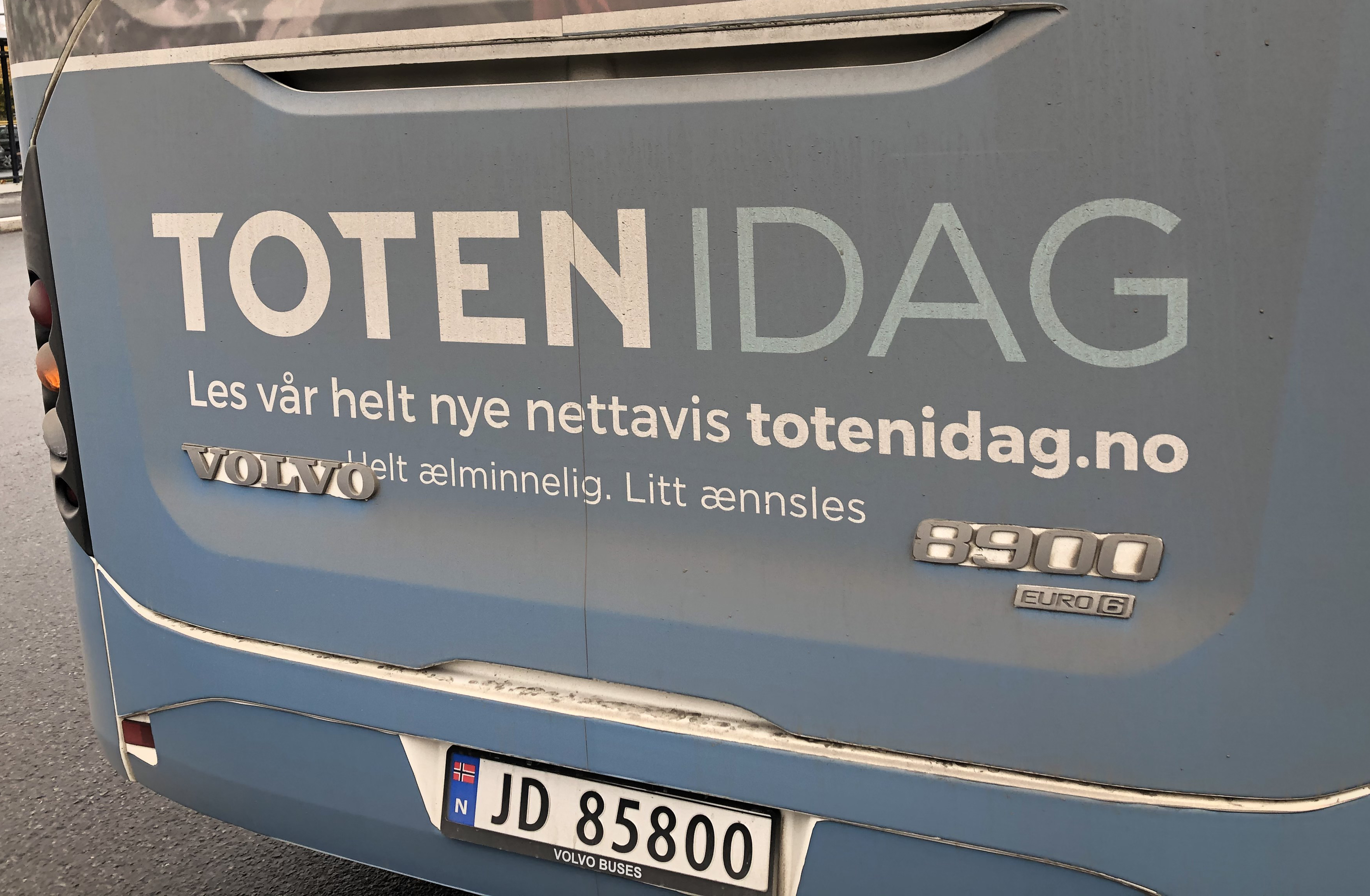 Toten Idag, bybuss, Gjøvik